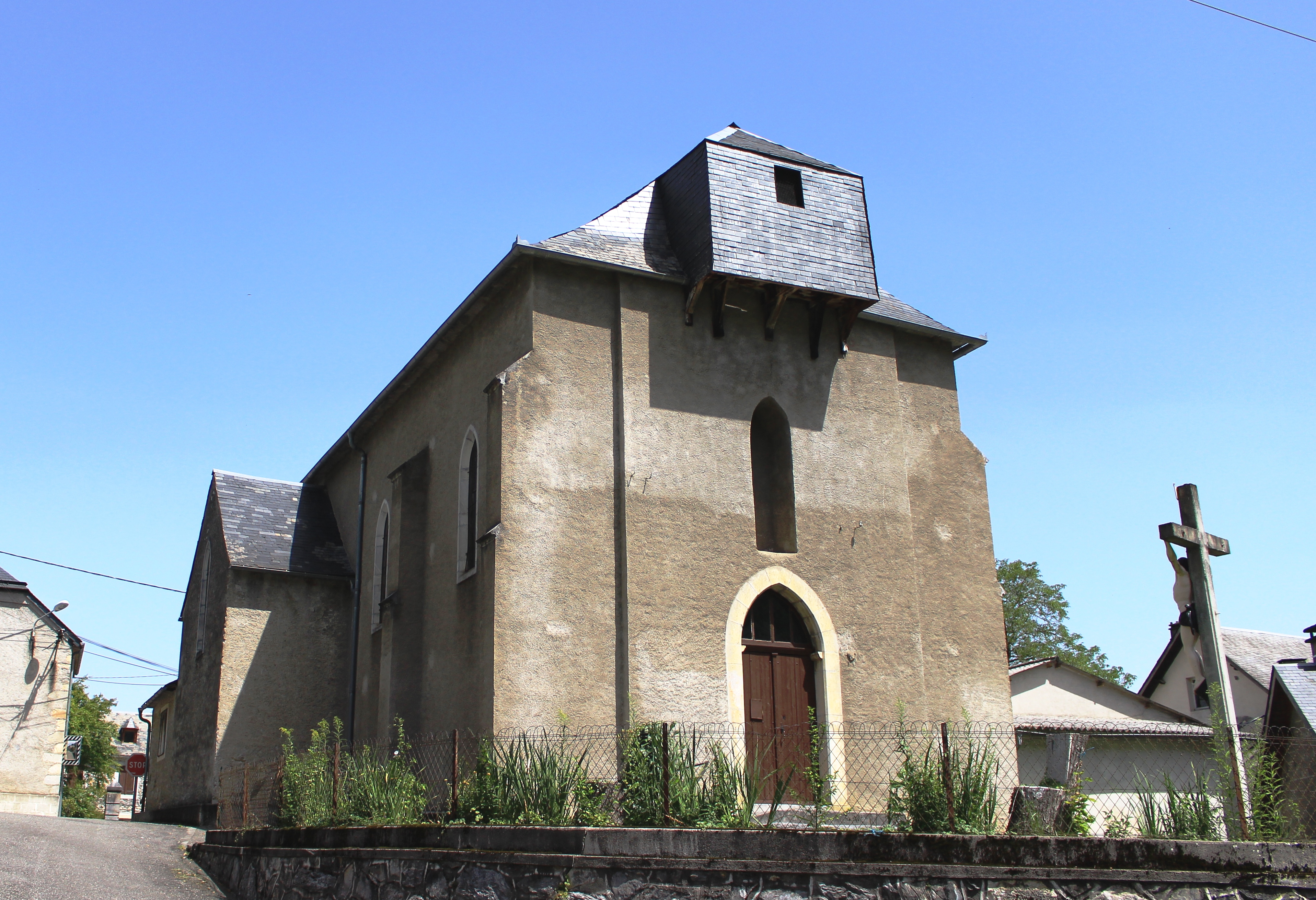 Église Saint-Barthélemy de Gazave (Hautes-Pyrénées)